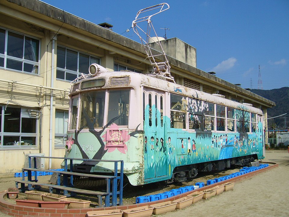 亀岡市立安詳小学校に保存されている京都市電700形726号 正面方向幕には「安詳発 幸福行」とある ※学校関係者の許可を得て撮影